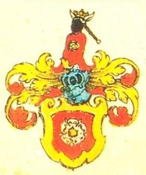 Stammwappen derer von Müllenheim ("v: Mvlheim")